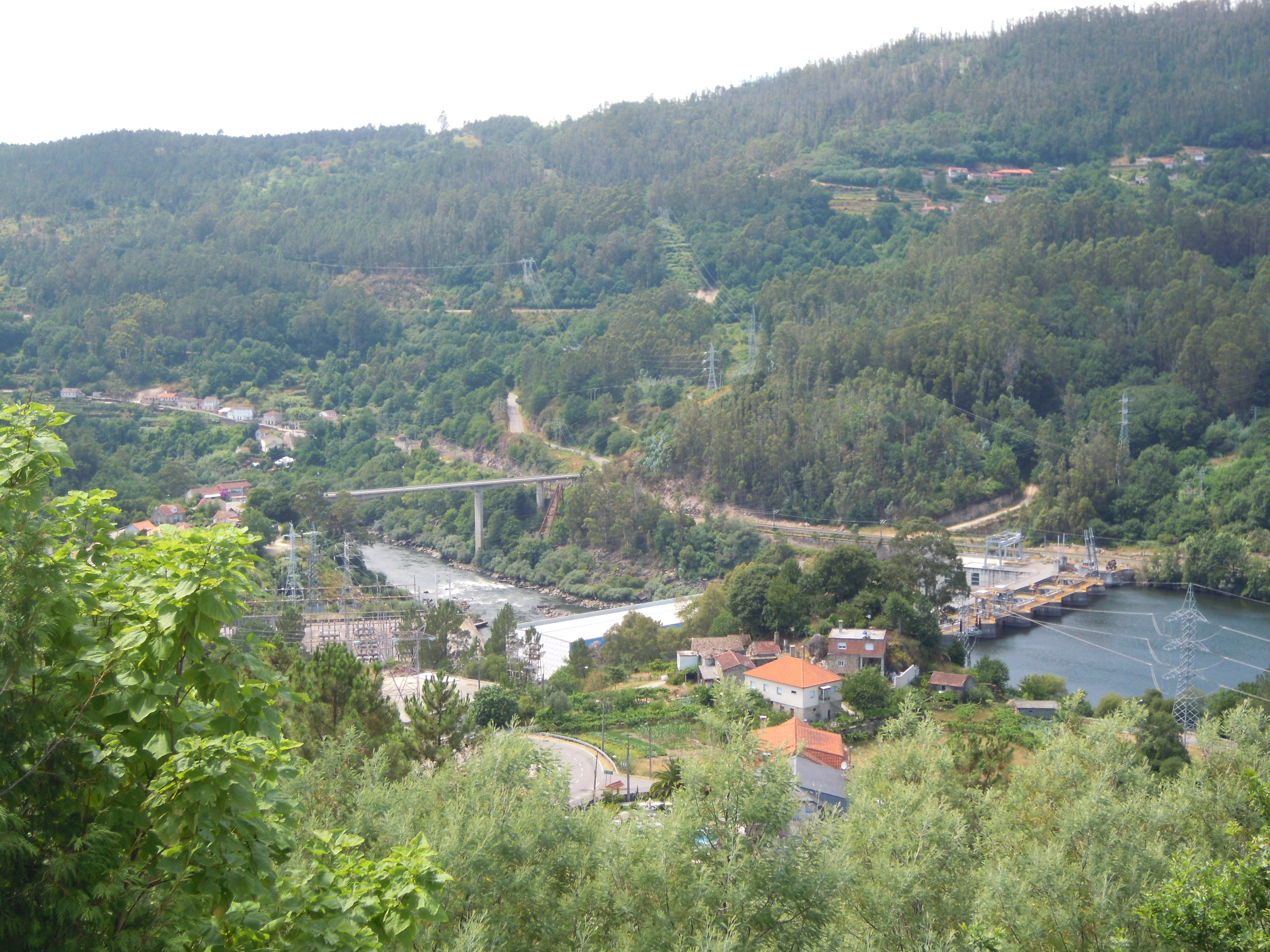 Vista da Frieira (Crecente) desde Desteriz (Padrenda)